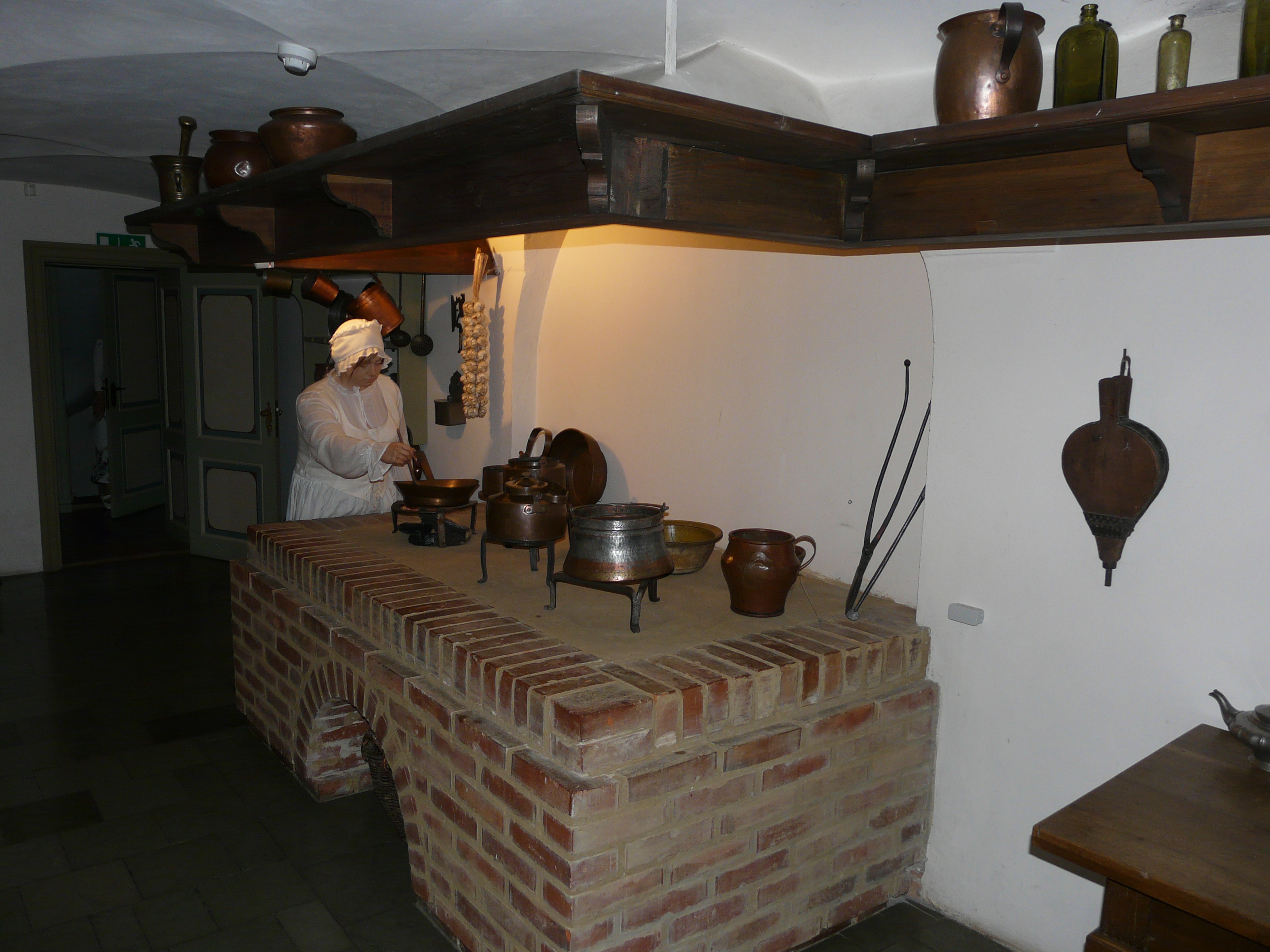 Gdańsk. Dom Uphagena